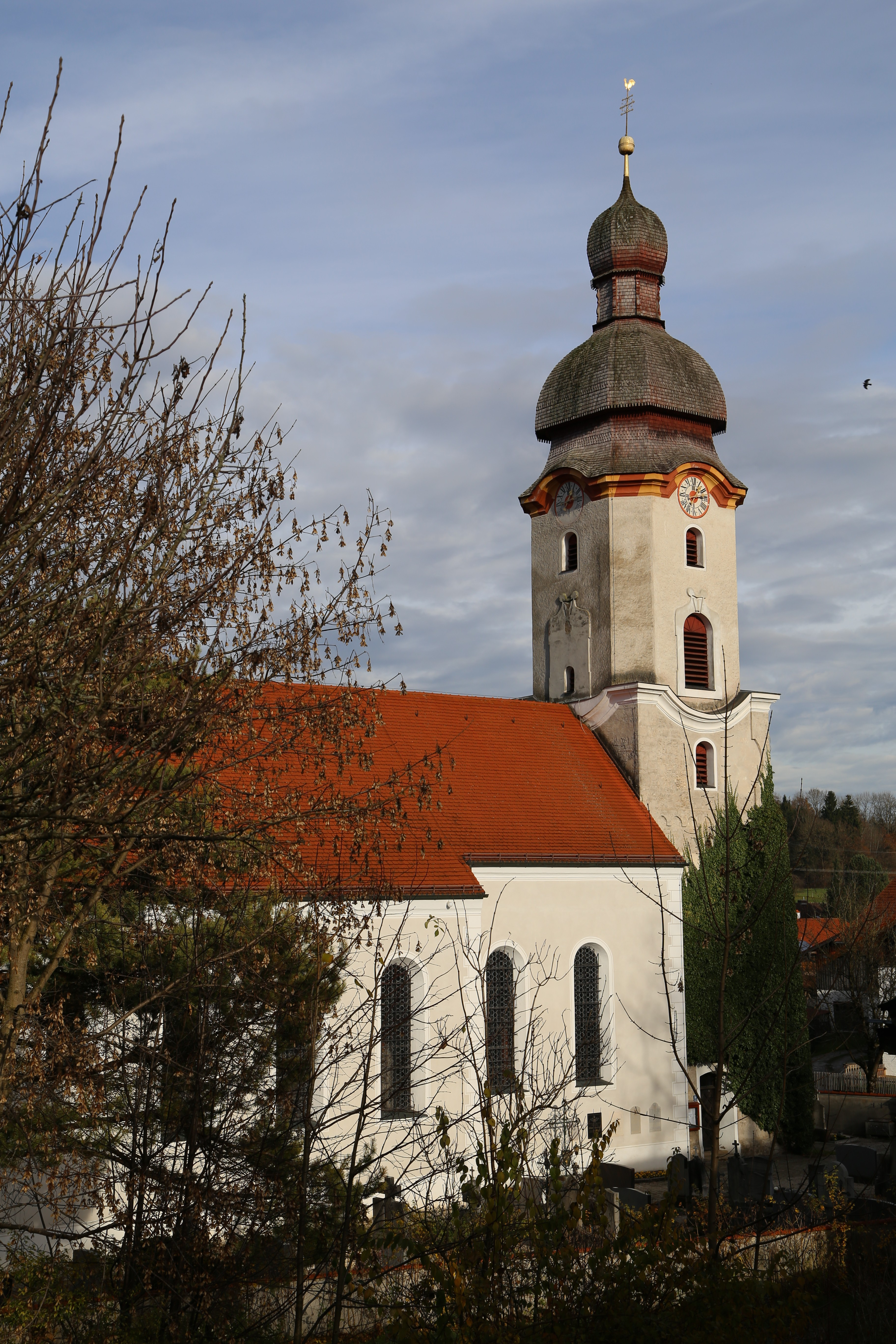 Thanning, Hauptstraße 14; Katholische Pfarrkirche St. Peter und Paul, barocke Saalkirche mit eingezogenem Chor und Ostturm, von Peter Reiser, 1786/87, Turmunterbau spätromanischer Chorturm; mit Ausstattung